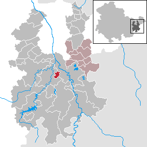 Teichwitz in Thuringia - District Greiz